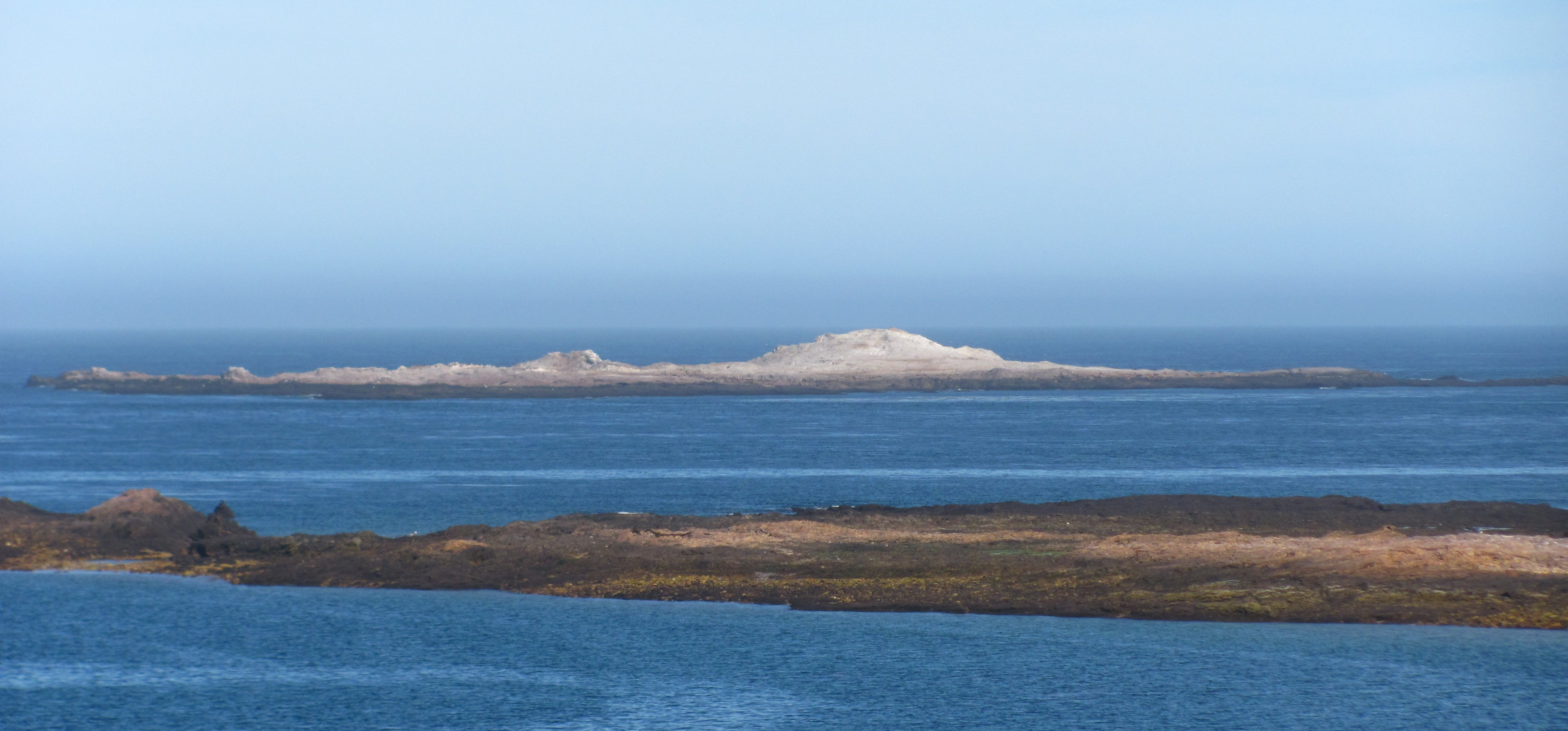 Vista de la isla Shat en marea baja - View of the Shag island during low tide